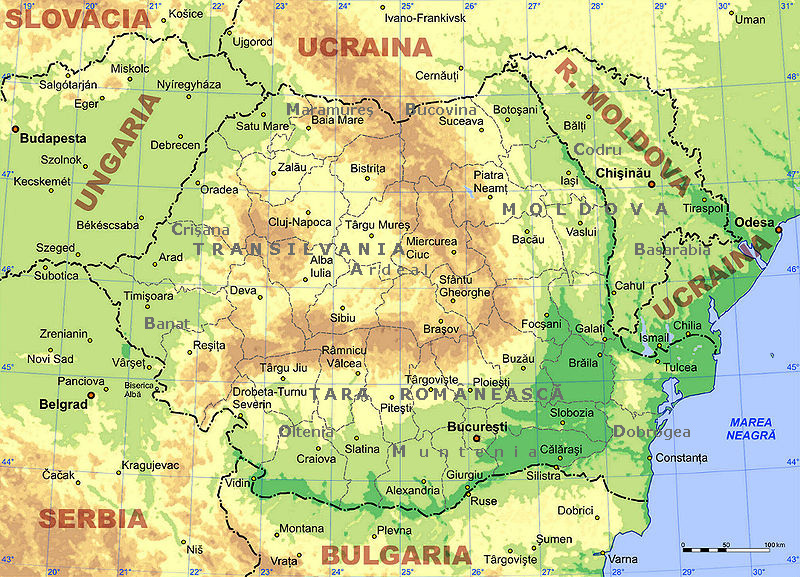 Physical map of Romania and surrounding areas, in bitmap format. Orthographic map projection with center at 25 E, 46 N. Keywords: Romania, map, physical map. Modern countries in brown, historic regions in grey (Țara Românească means Wallachia), judeţe (counties) limits in interrupted lines. Harta fizică a României în format bitmap. Proiecţie ortografică cu centrul la 25 E, 46 N. Cuvinte cheie: România, hartă, harta fizică